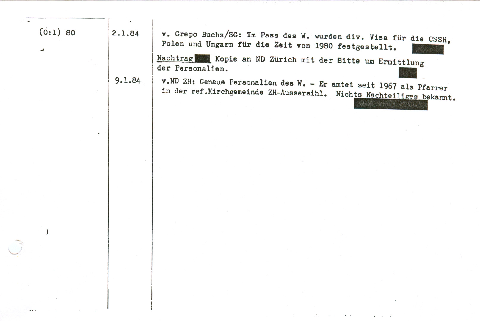 Beispiel einer Kopie einer Karteikarte (Rückseite) eines Zürcher Bürgers. Die Daten sind übrigens unabsichtlich fehlerhaft und es kann so heute keiner Person mehr zugeordnet werden.